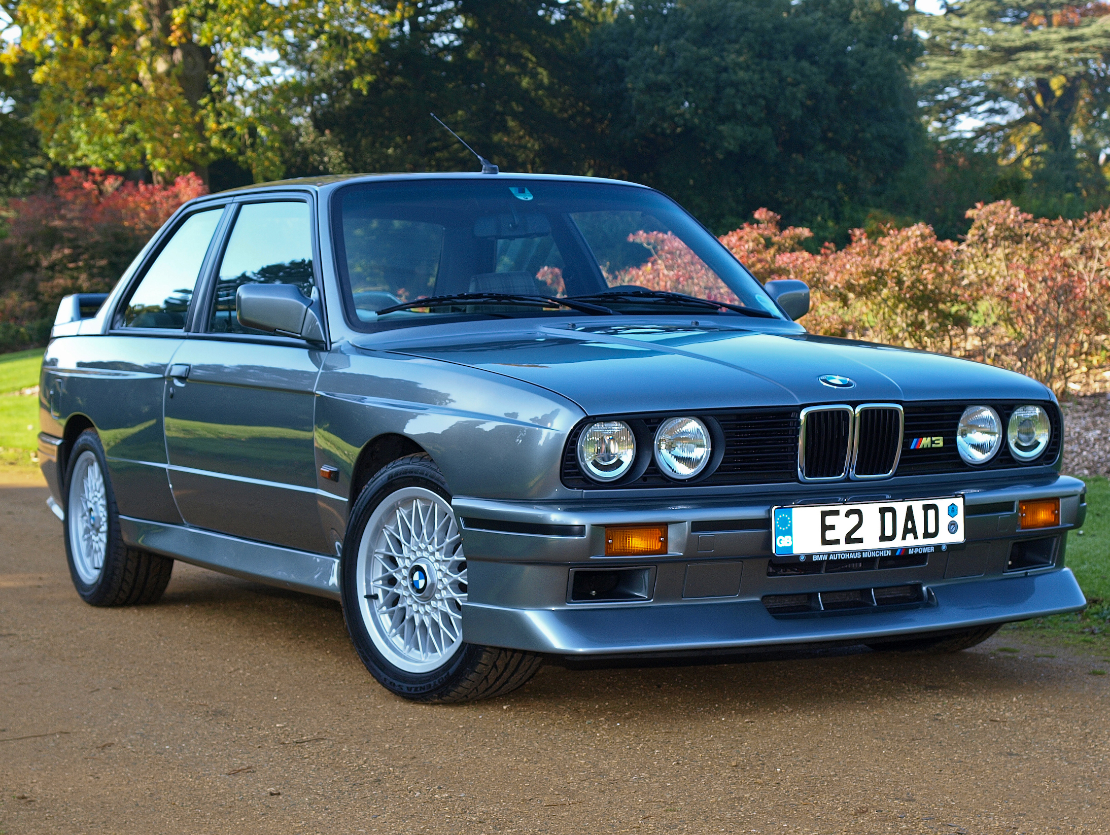 BMW M3